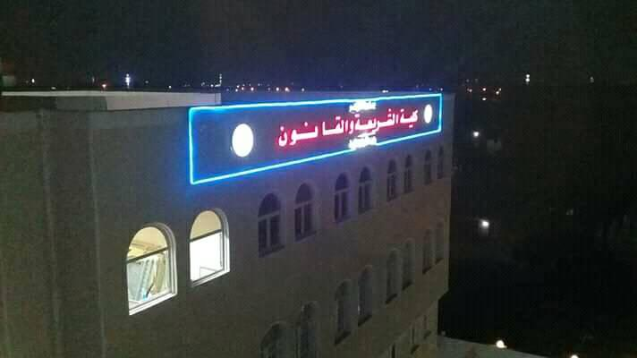 صوره لواجهة كليه الشريعه والقانون بعد تجديدات العيد الاستاذ الدكتور عبدالحليم منصور